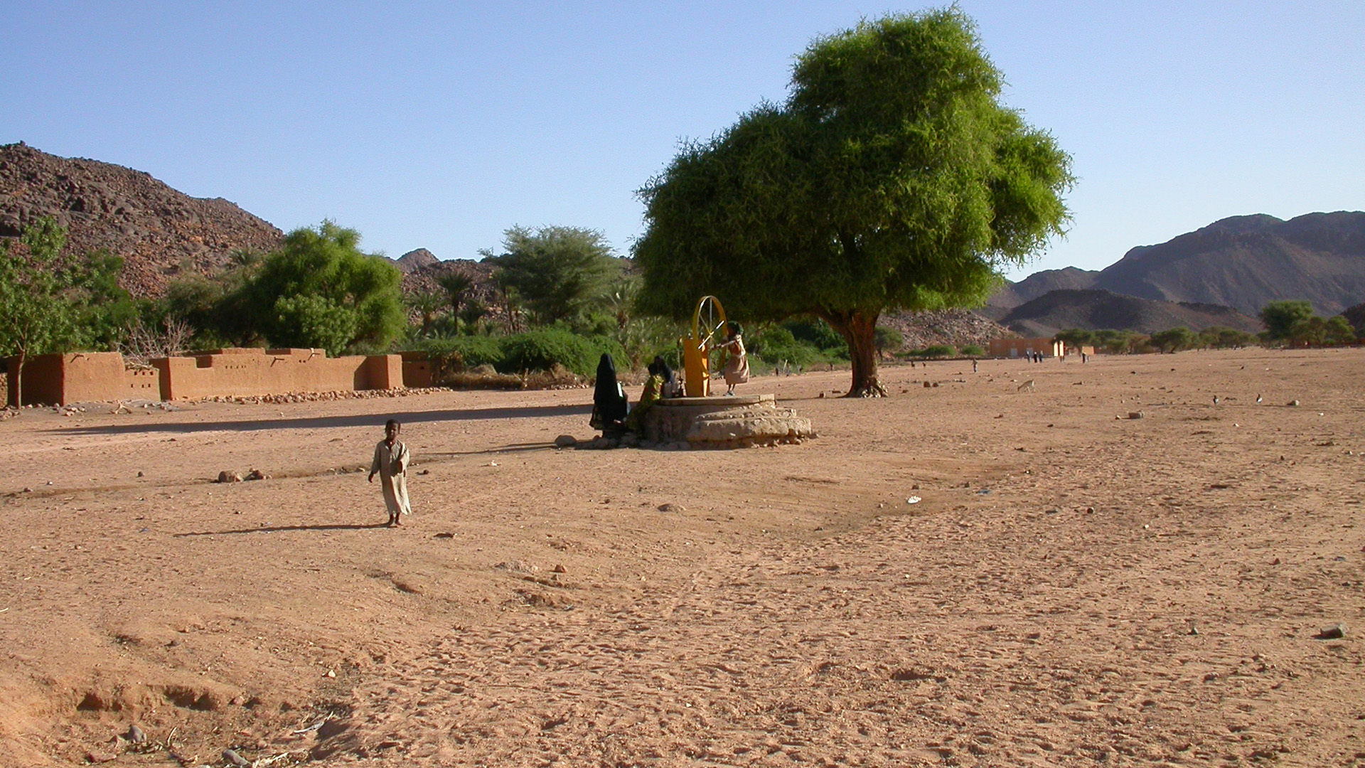 Timia